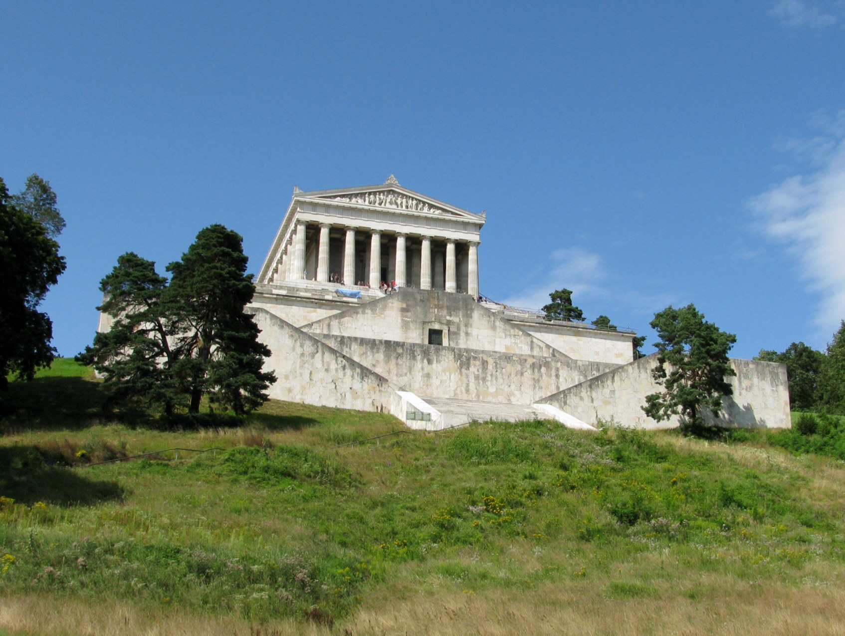 Walhalla-Ansicht aus Richtung des Donau-Ufers